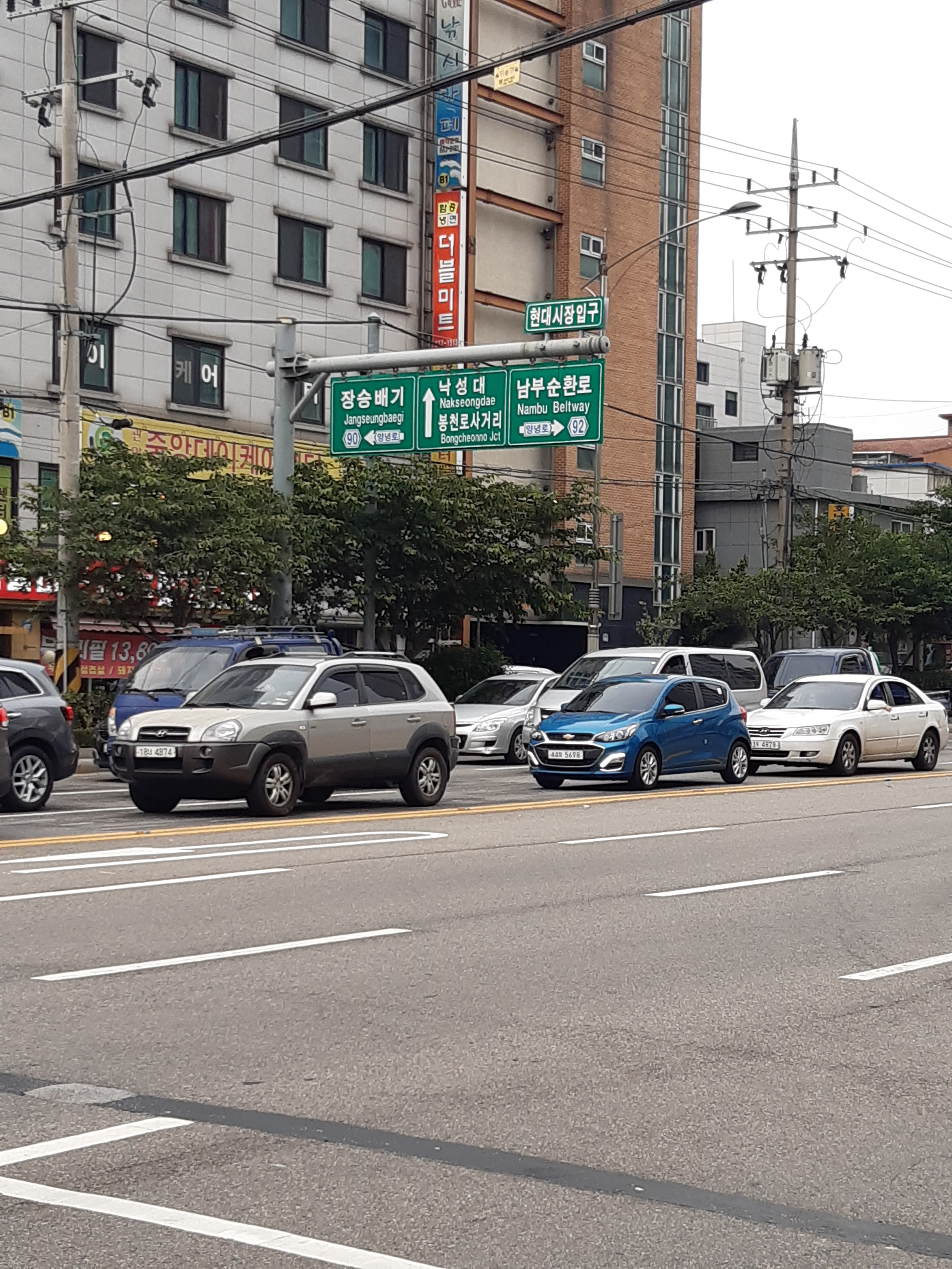 은천로(서울)